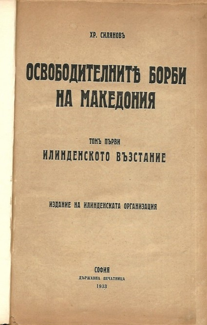 Заглавна страница на „Освободителните борби на Македония“, (том 1).